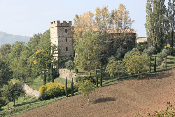 panoramica del castello di Montechino in Val Riglio